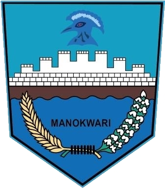 Lambang Kabupaten Manokwari, Provinsi Papua Barat, Republik Indonesia.